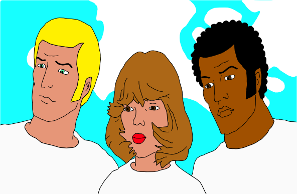 RTPPOTA Fan art